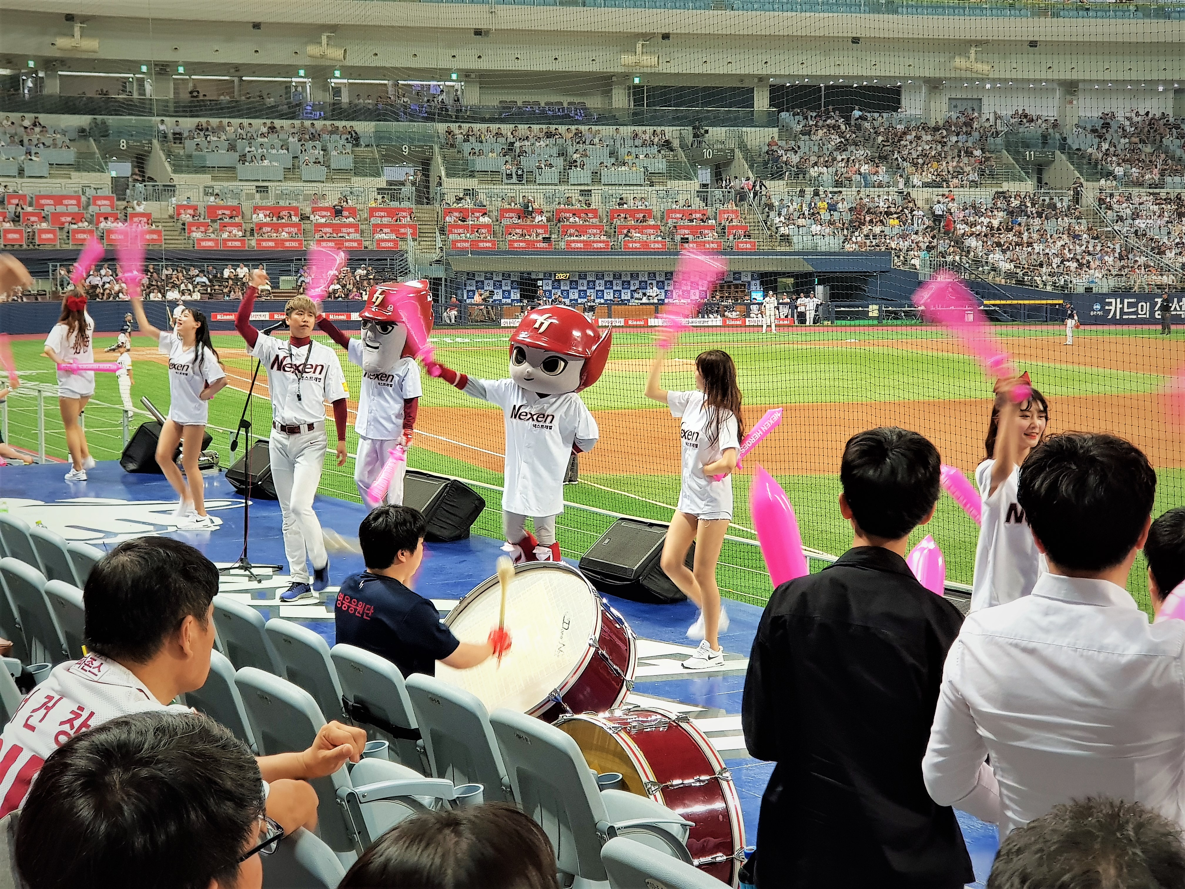 넥센 히어로즈의 응원단이 고척돔에서 응원을 펼치고 있다